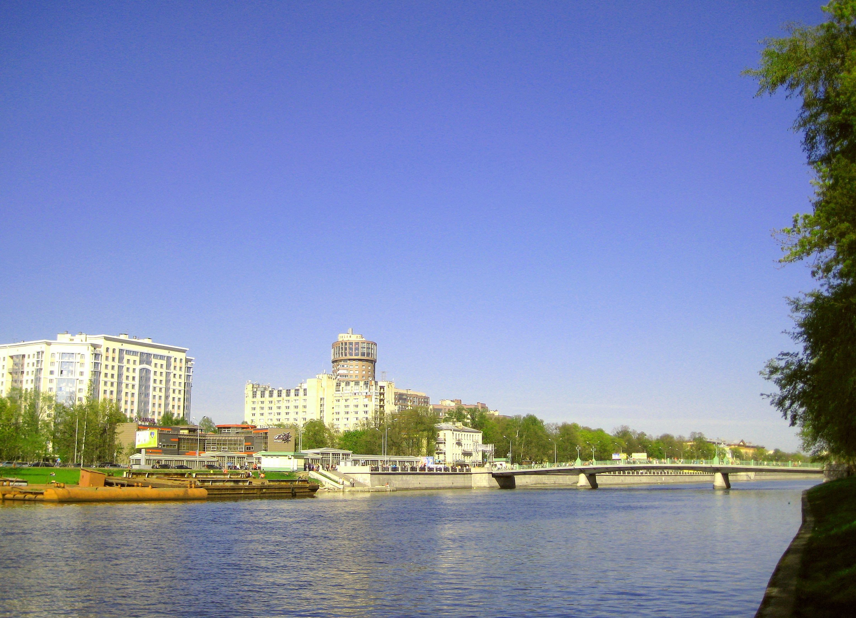 Санкт-Петербург. 3-й Елагин мост